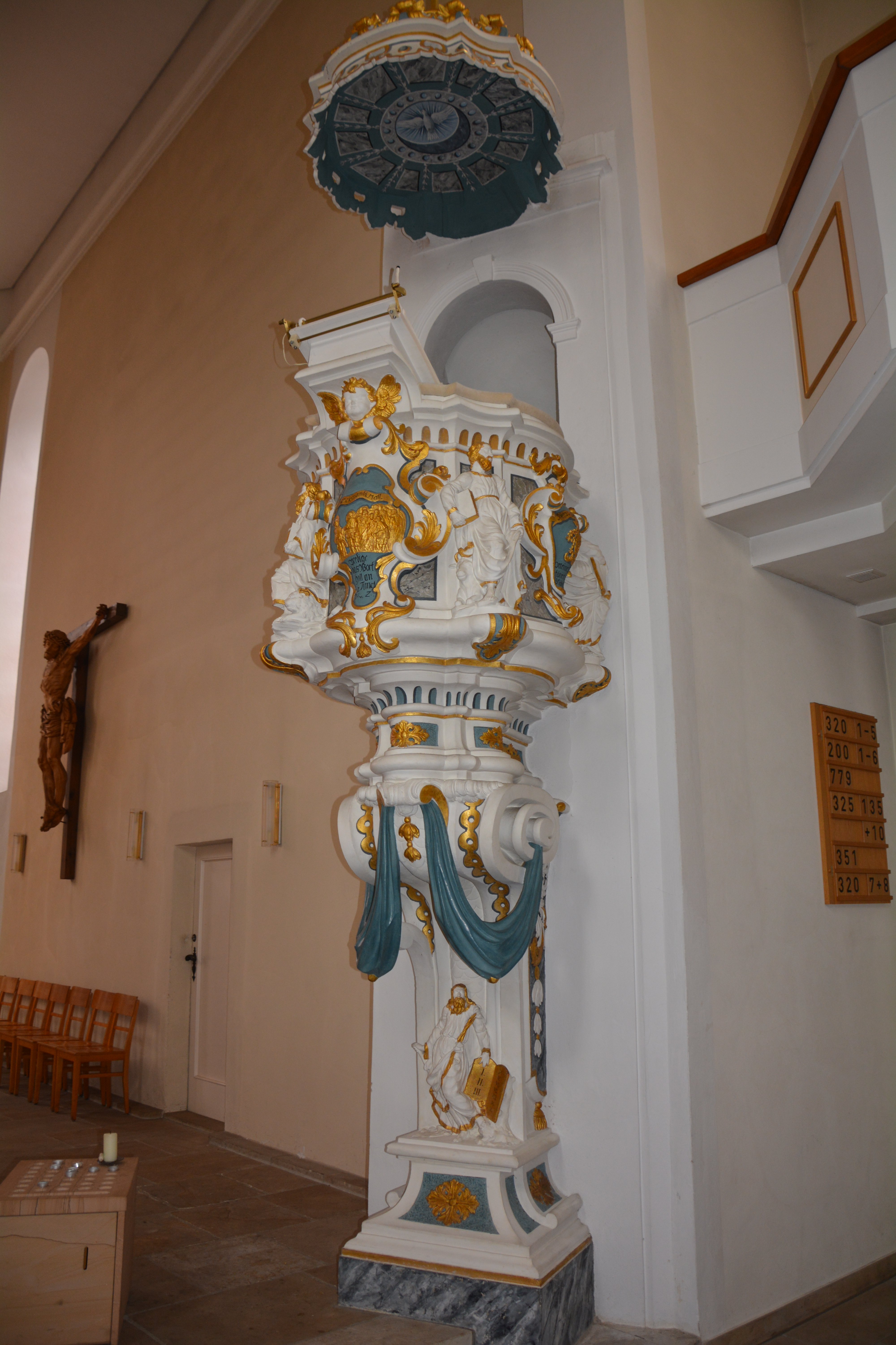 Stadtkirche "Zum Heiligen Namen Gottes" Radeberg, Innenansicht